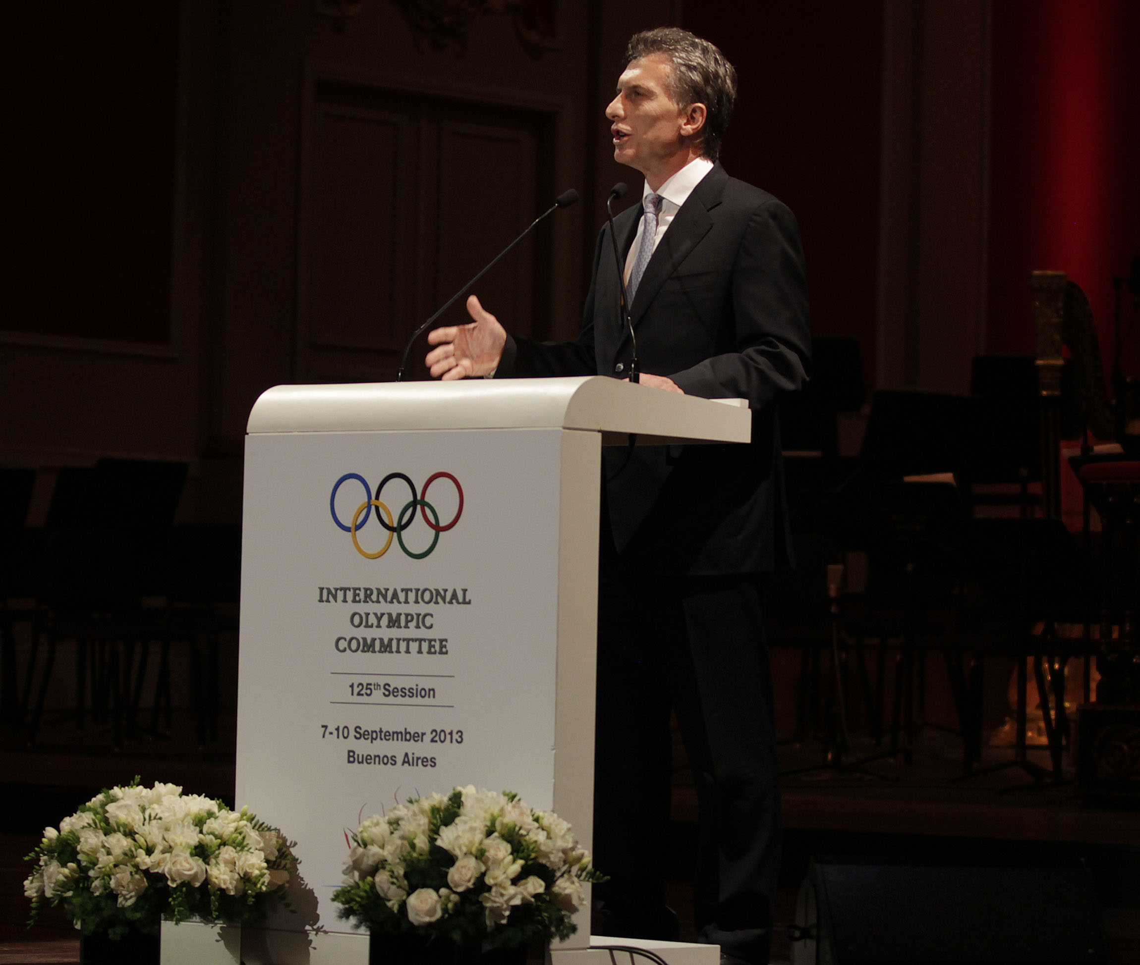 Buenos Aires. Setiembre 6 de 2013- El Jefe de Gobierno porteño, Mauricio Macri, fue anfitrión de la 125° Asamblea del COI realizada en el Teatro Colón. Foto marcelo Baiardi-gv/GCBA.